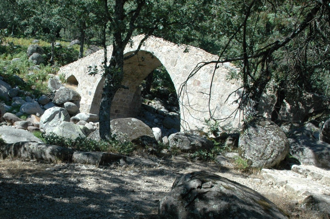 Puente.